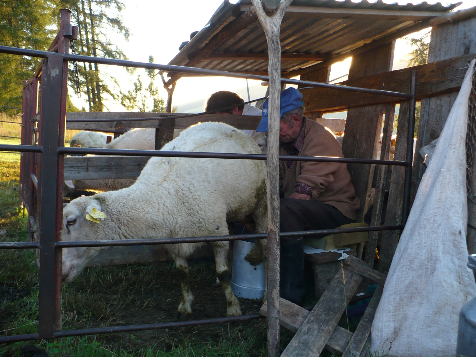 Jezersko je obec na Slovensku v okrese Kežmarok. Nad obcou sa nachádza Jezerské jazero (919 m.n.m.), je to prírodná rezervácia s rozlohou 2,18 ha.